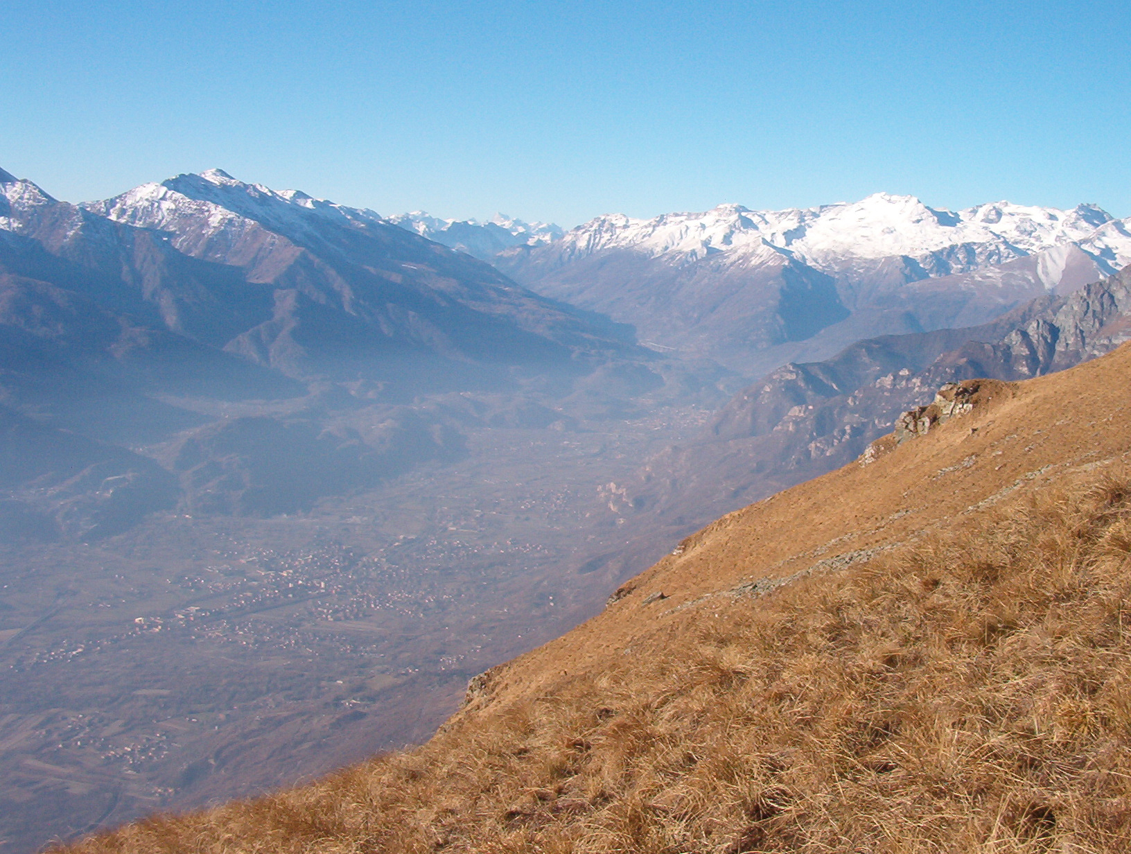 Panorama Val di Susa - Piemonte - Italy